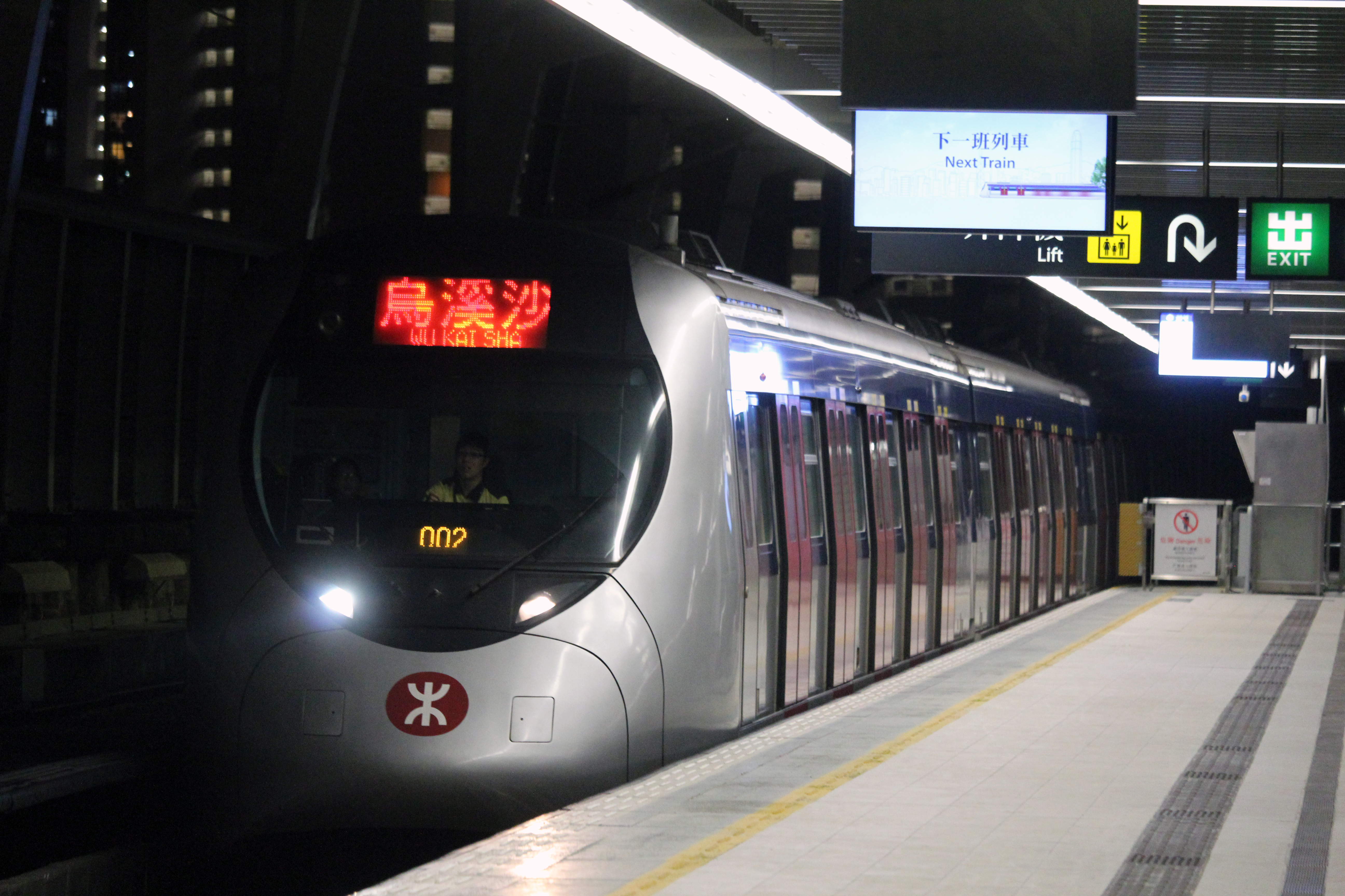 SP1950列車進入馬鞍山站